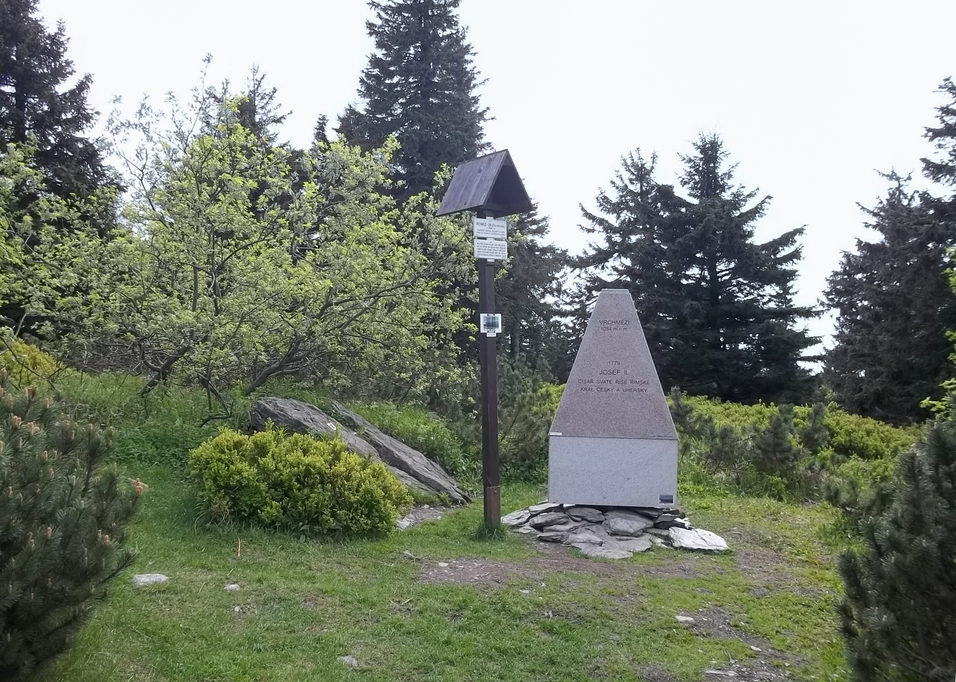 Szczyt Orlicy (Vrchmezí) w Górach Orlickich